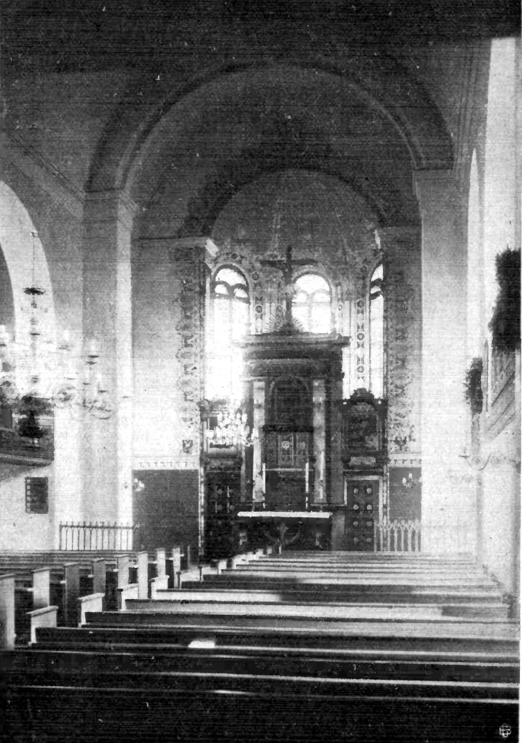 Kircheninneres nach dem Umbau 1915.